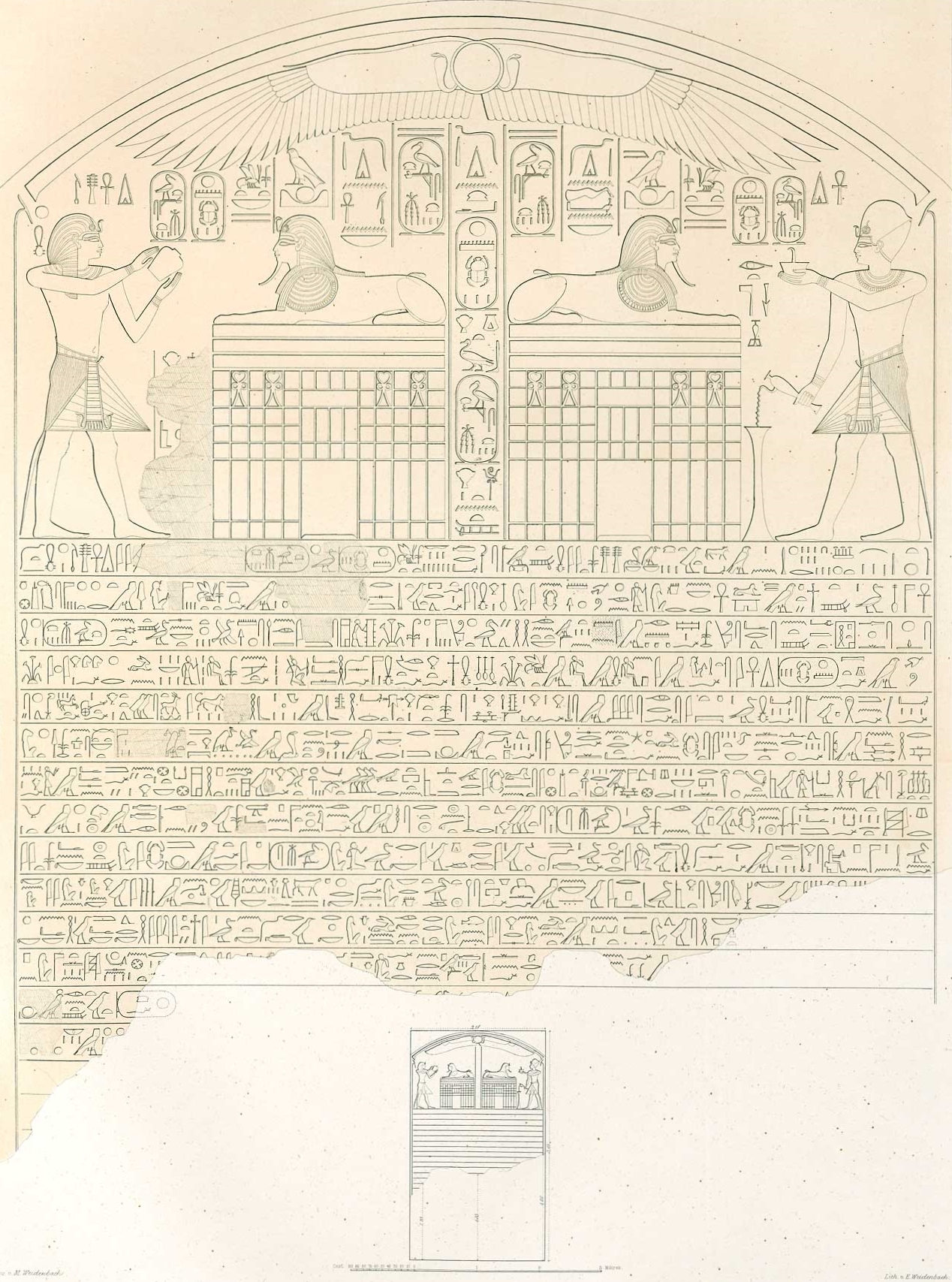 Pyramiden von Giseh, Stele vor dem großen Sphinx, Ägypten